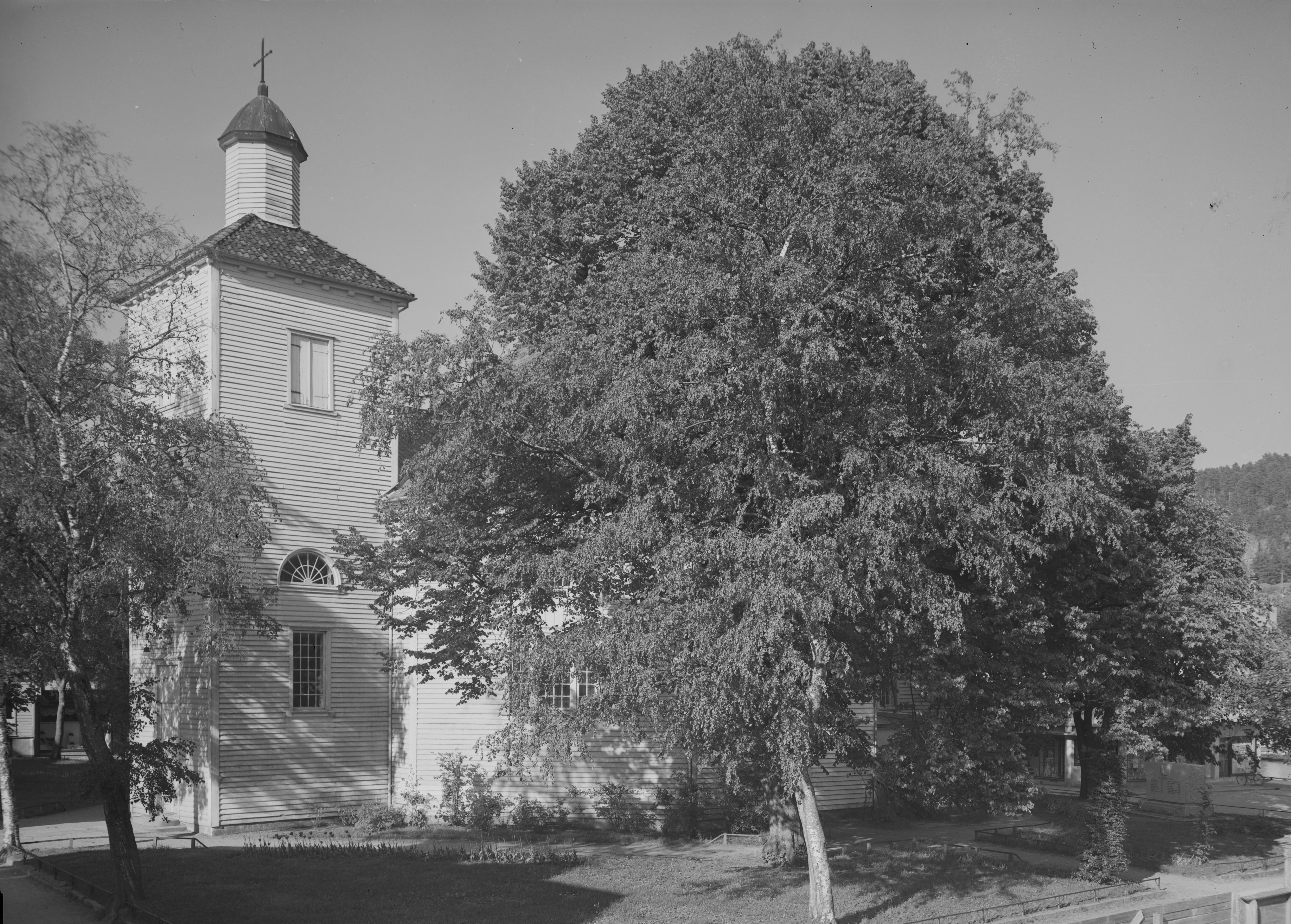 Bildet er hentet fra Nasjonalbibliotekets bildesamling. Anmerkninger til bildet var: Fotograf:Ukjent Flekkefjord, Flekkefjord, Vest Agder